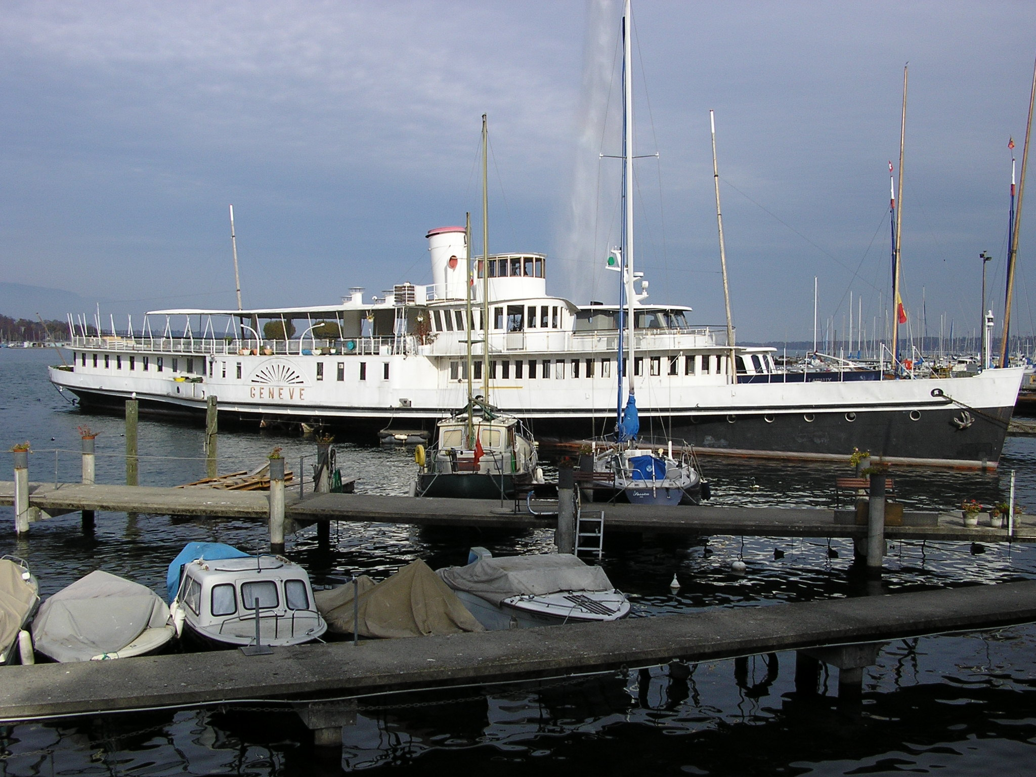 Le Genève, bateau anciennement de la Compagnie générale de navigation sur le lac Léman (CGN)